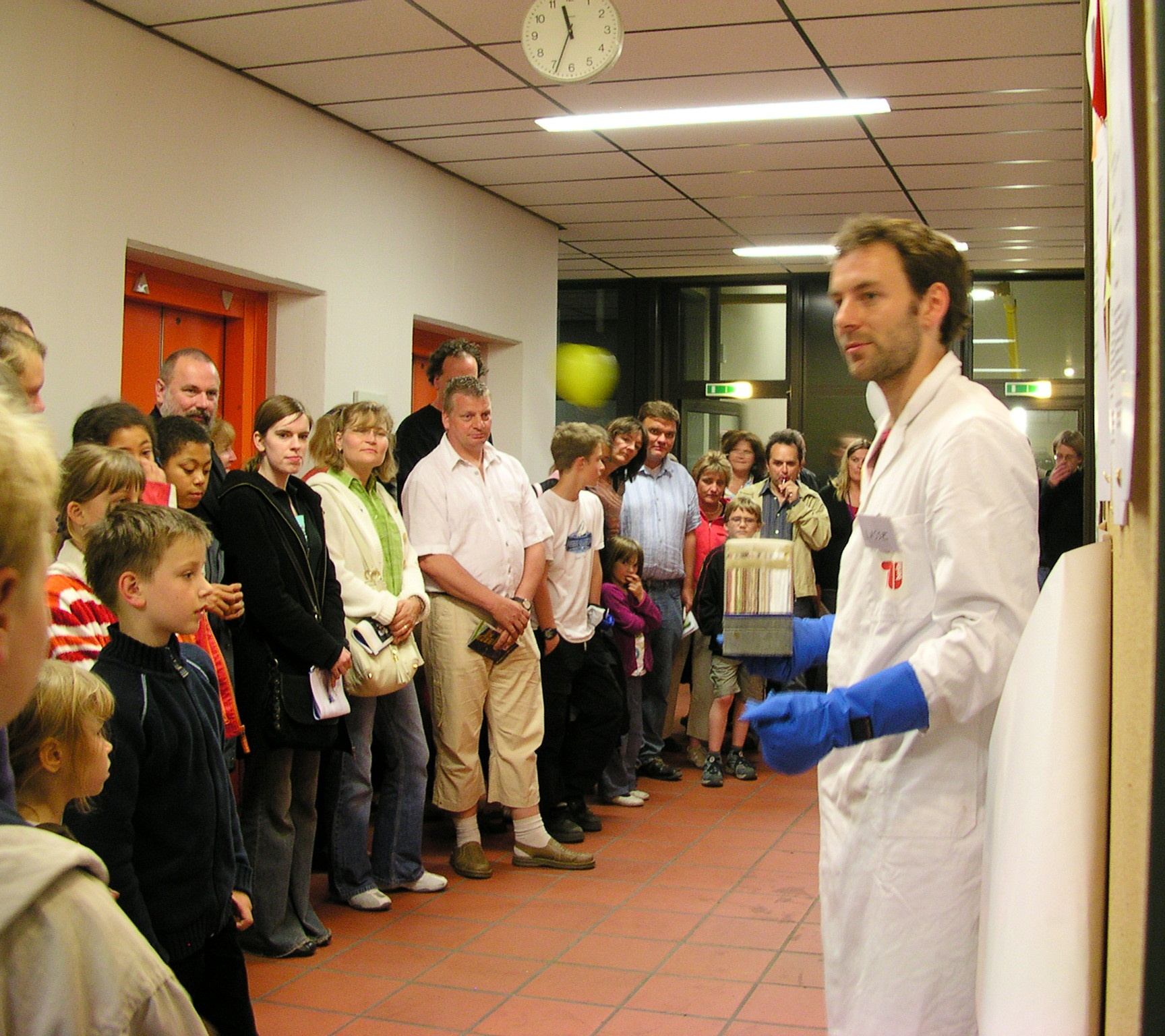 Aufnahme der Veranstaltung Heute bleibt die Küche kalt: Wir „kochen“ bei minus 200 Grad im Rahmen der Langen Nacht der Wissenschaften am 13. Mai 2006 in Berlin, veranstaltet durch das Institut für Atomare Physik und Fachdidaktik der Technischen Universität Berlin